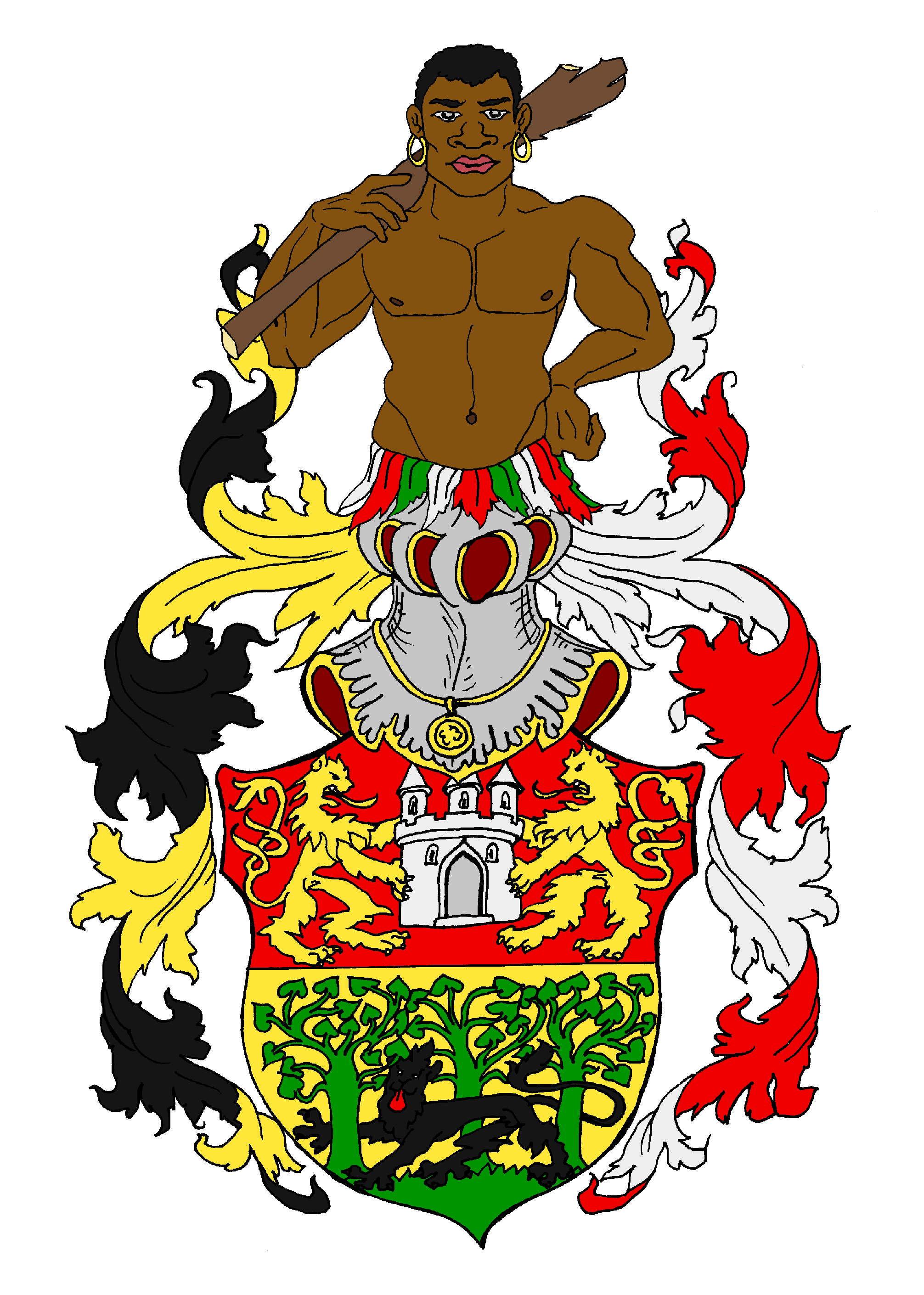 Wappen der von Freyburg, ursprünglich eigentlich „Schlottmann von Freyburg“, eines briefadligen Geschlechts, das 1703 durch Nobilitierung der Brüder Niclas und Christian Schlottmann entstand, in Mecklenburg und Preußen blühte und in der ersten Hälfte des 20. Jahrhunderts ausstarb. Das 1703 bestätigte Wappen ist geteilt. Es zeigt oben in Rot eine von zwei goldenen Löwen gehaltene silberne Burg mit drei spitzen Türmen, unten in Gold auf grünem Rasen drei grüne Lindenbäume, wobei hinter (auch: vor) dem mittlerem ein schwarzer Leopard/Panther schreitet. Auf dem Helm mit rechts schwarz-goldenen, links rot-silbernen Decken ein wachsender Mohr mit silbern-rot-grünem Federschurz, der mit der rechten Hand einen Kolben schultert und die linke Hand in die Hüfte stemmt.